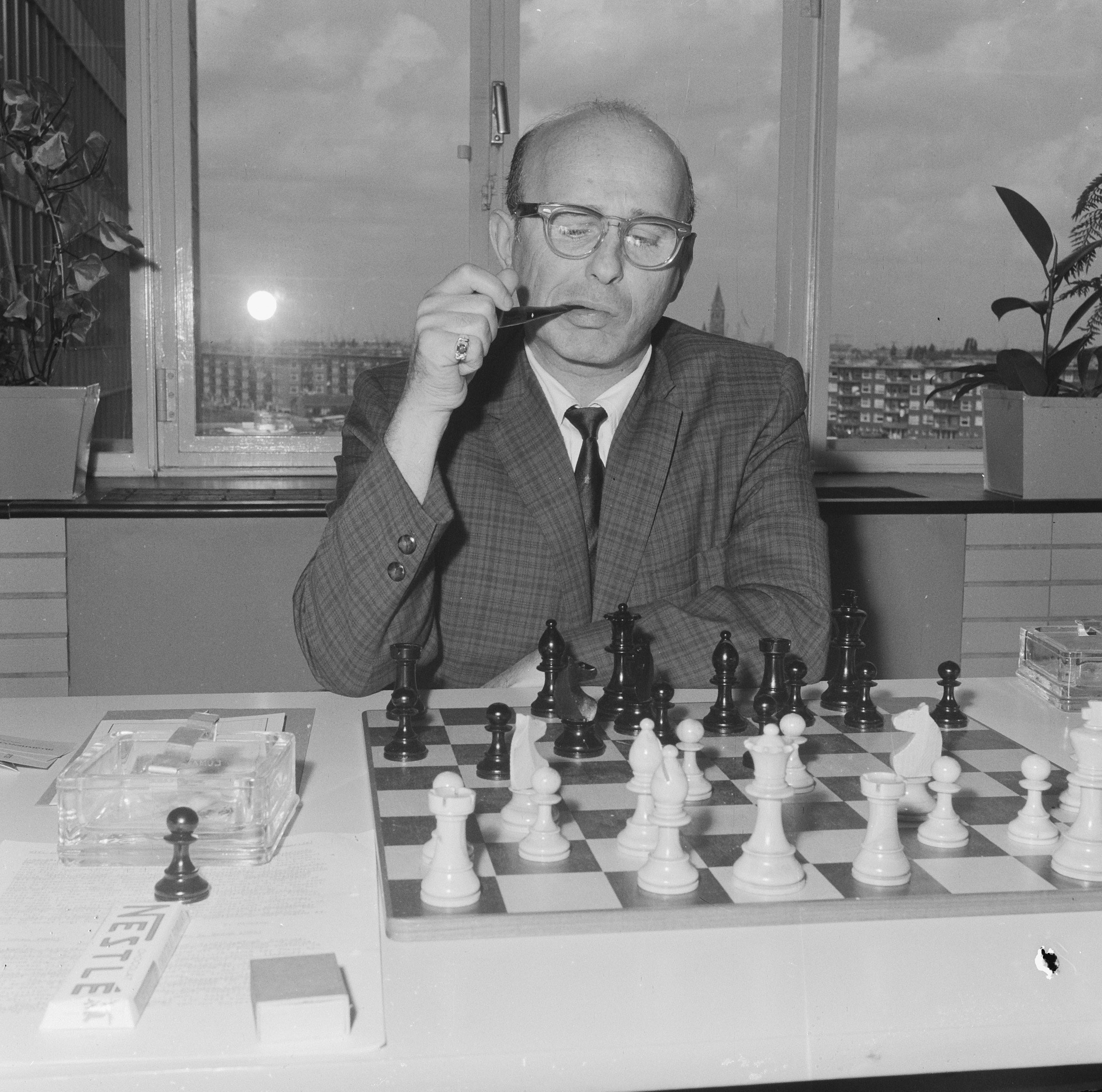 Collectie / Archief : Fotocollectie Anefo Reportage / Serie : [ onbekend ] Beschrijving : Interzone schaaktoernooi in het GAK, Bronstein Datum : 8 juni 1964 Trefwoorden : SCHAAKTOURNOOIEN Instellingsnaam : GAK Fotograaf : Broers, F.N. / Anefo Auteursrechthebbende : Nationaal Archief Materiaalsoort : Negatief (zwart/wit) Nummer archiefinventaris : bekijk toegang 2.24.01.03 Bestanddeelnummer : 916-5230